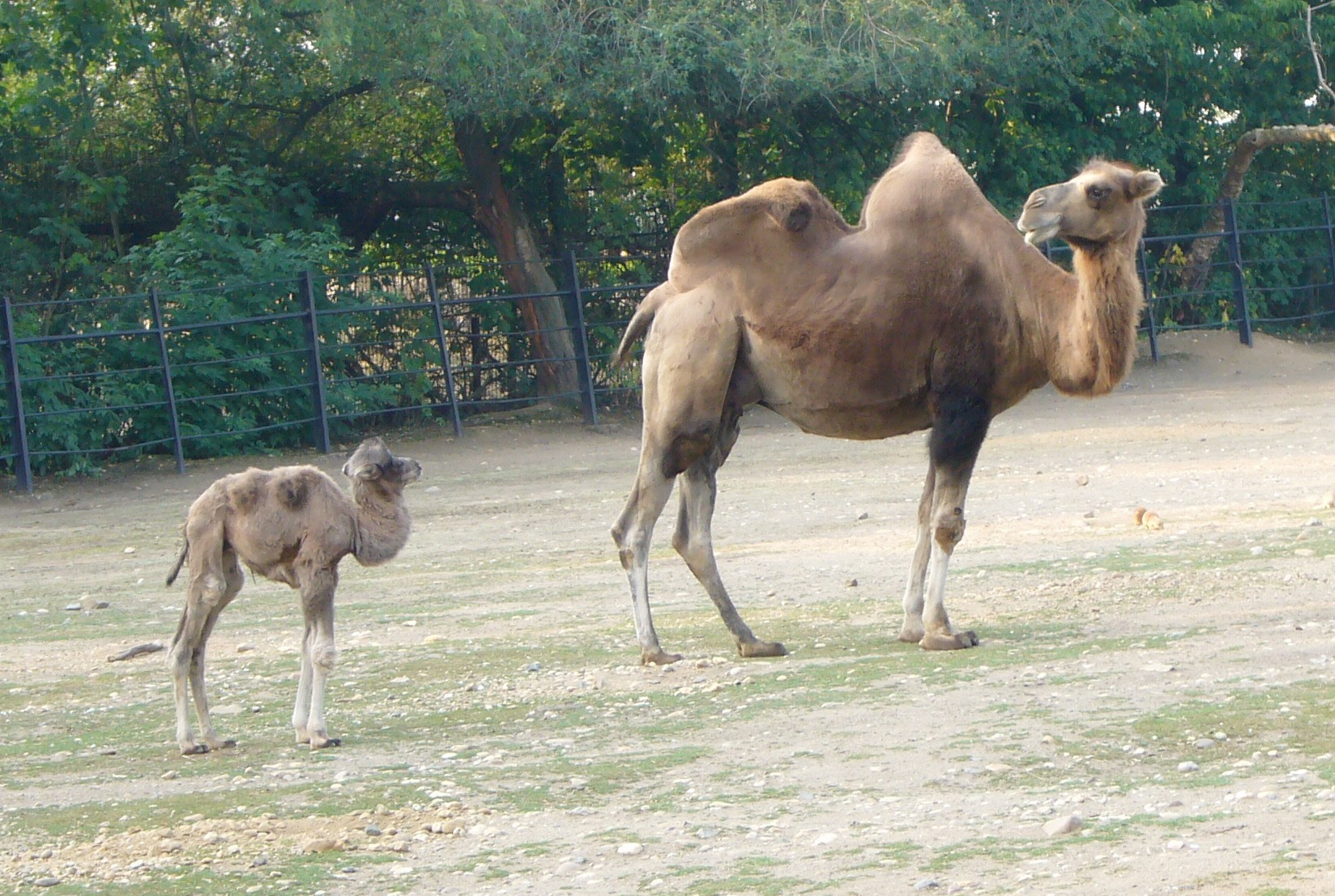 Velbloudice s týdenním mládětem (Zoo Praha)